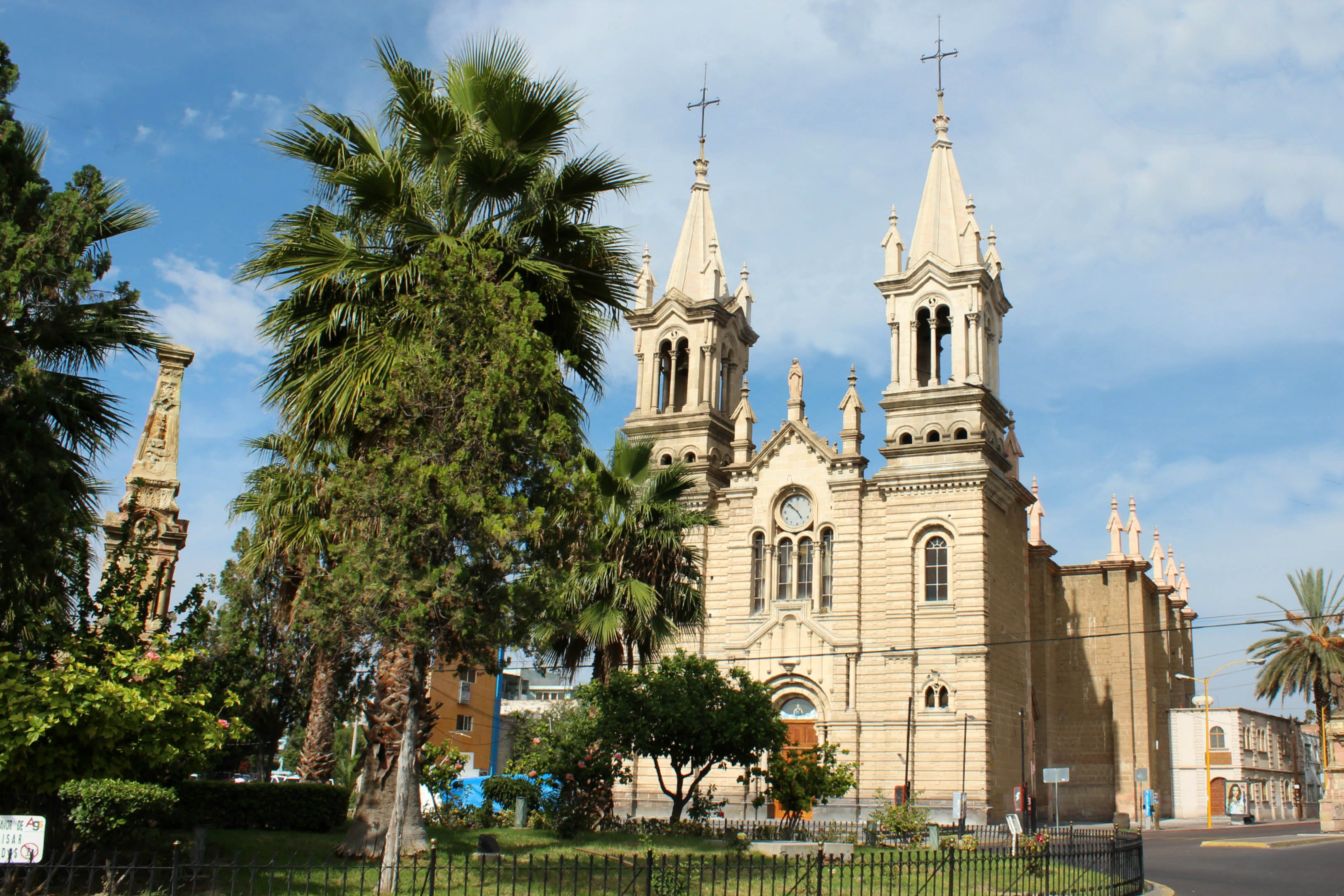 TEMPLO DE LA PURISIMA CONCEPCION